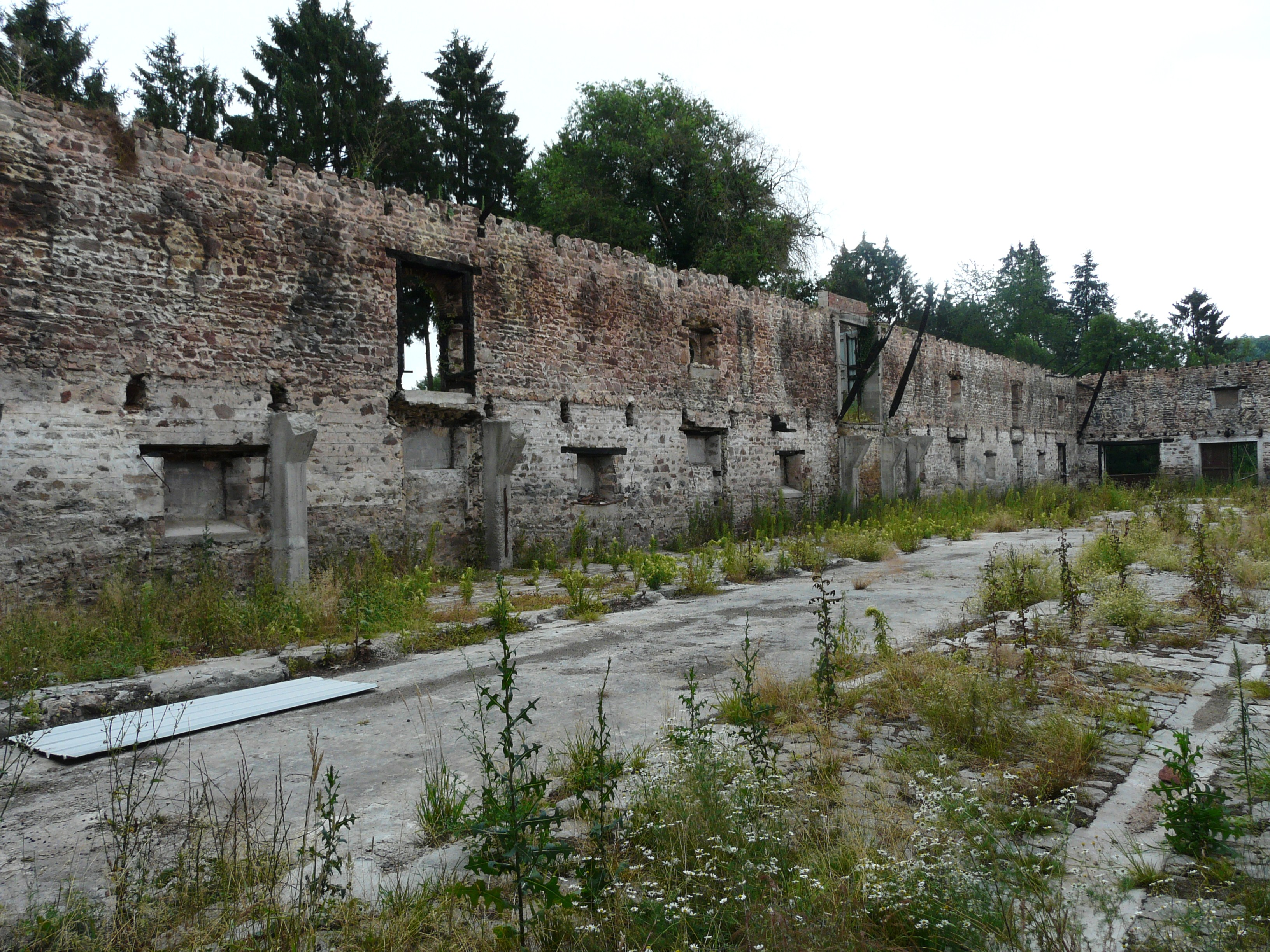 L'intérieur du bâtiment en ruines de l'ancienne forge, la Forge de Bessous, Le Chalard, Haute-Vienne, France.